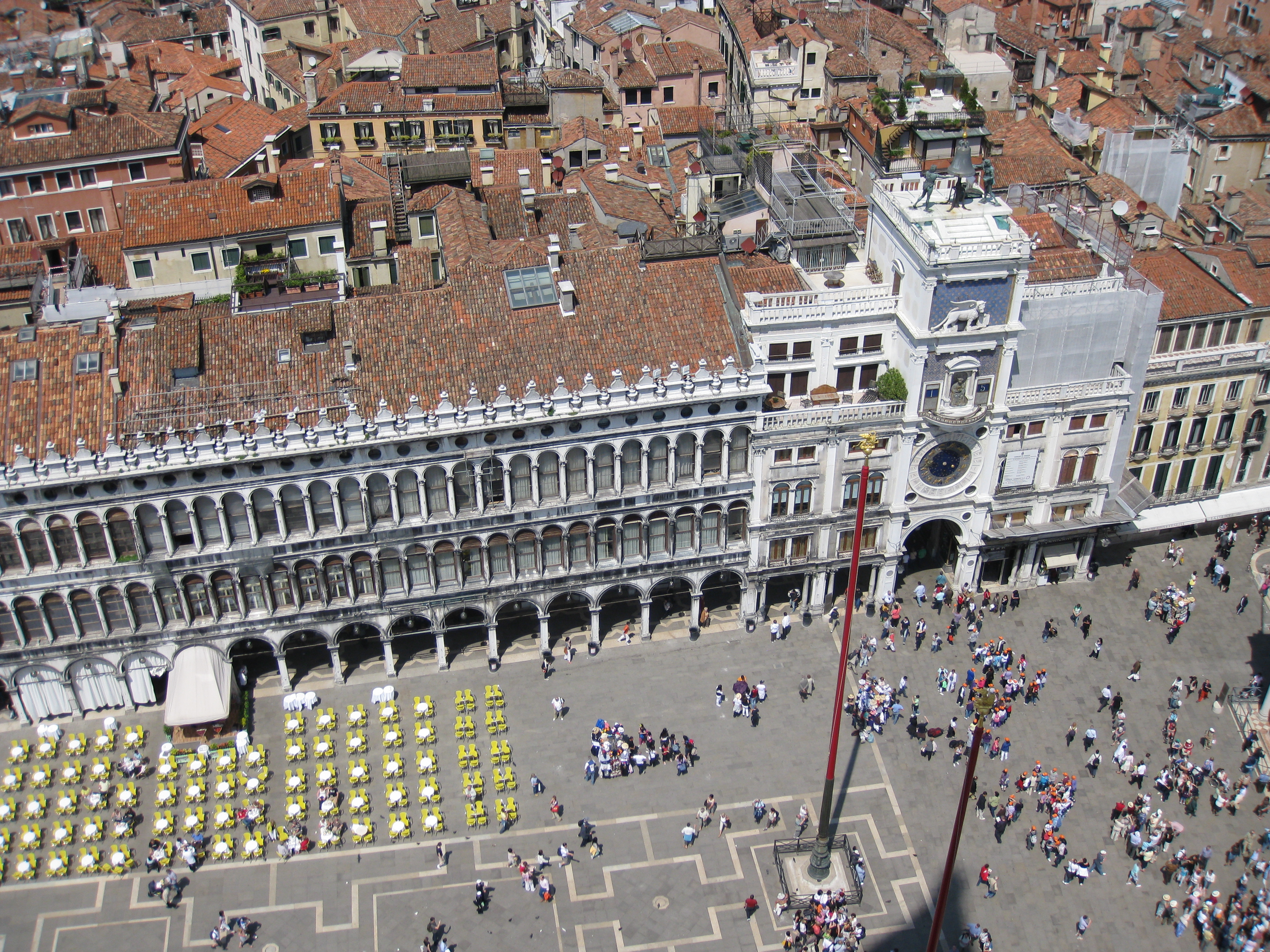 View from the Campanile of St. Marks Basilica הנוף הנשקף ממגדל הפעמונים של כנסיית סנט מרקס